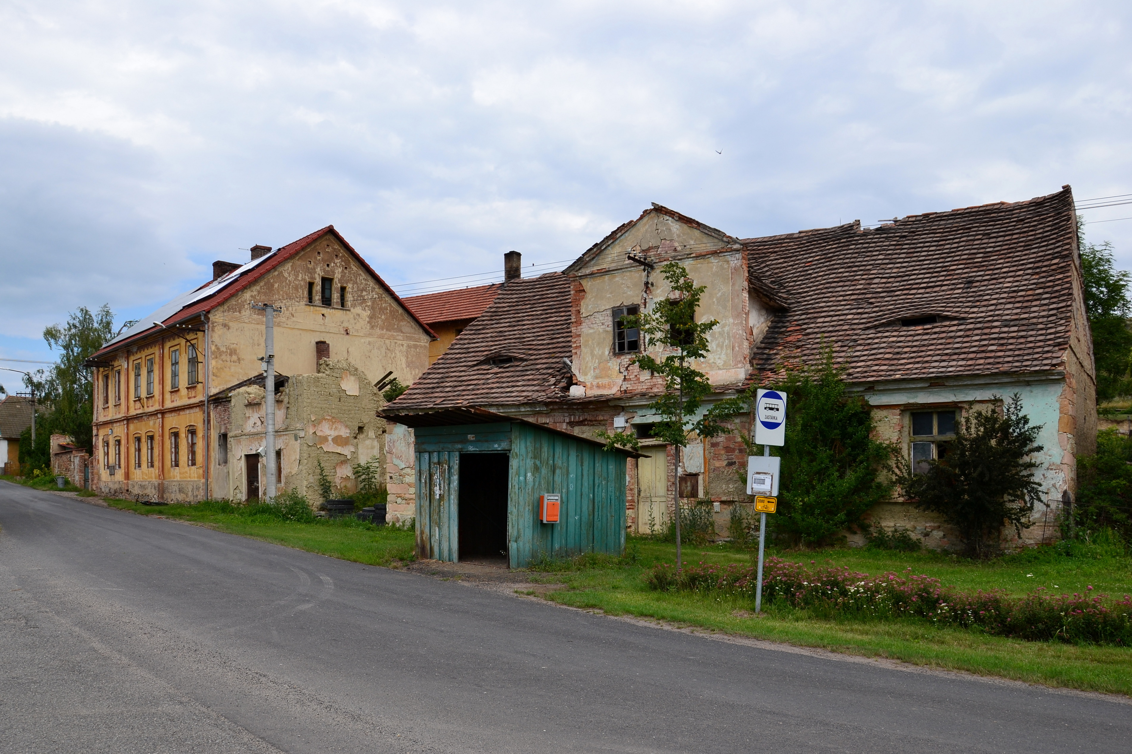 Domy u kaple